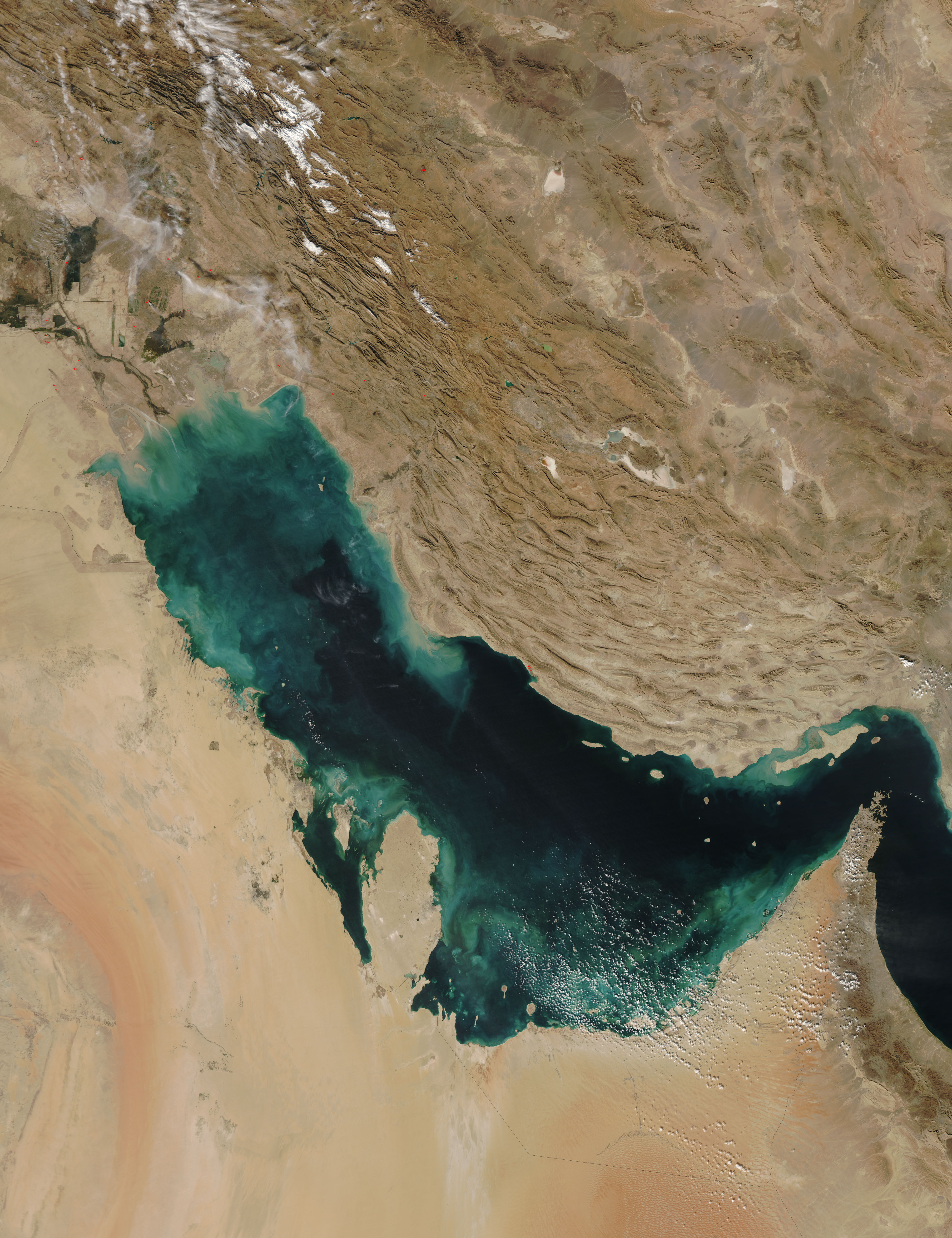 arabian Gulf